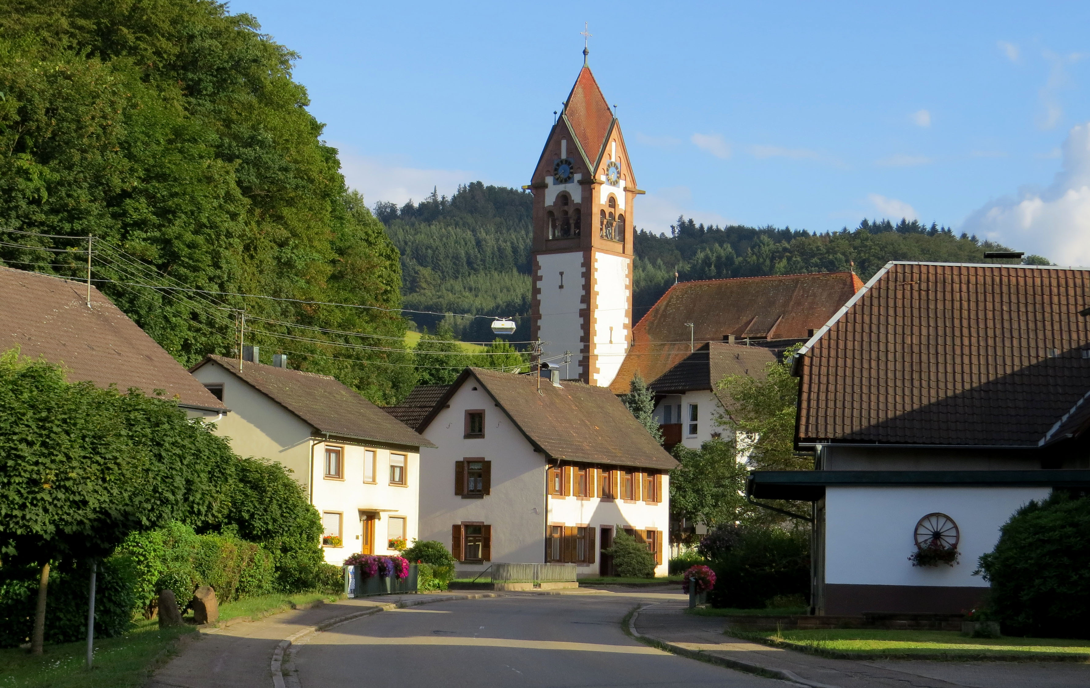 Schuttertal